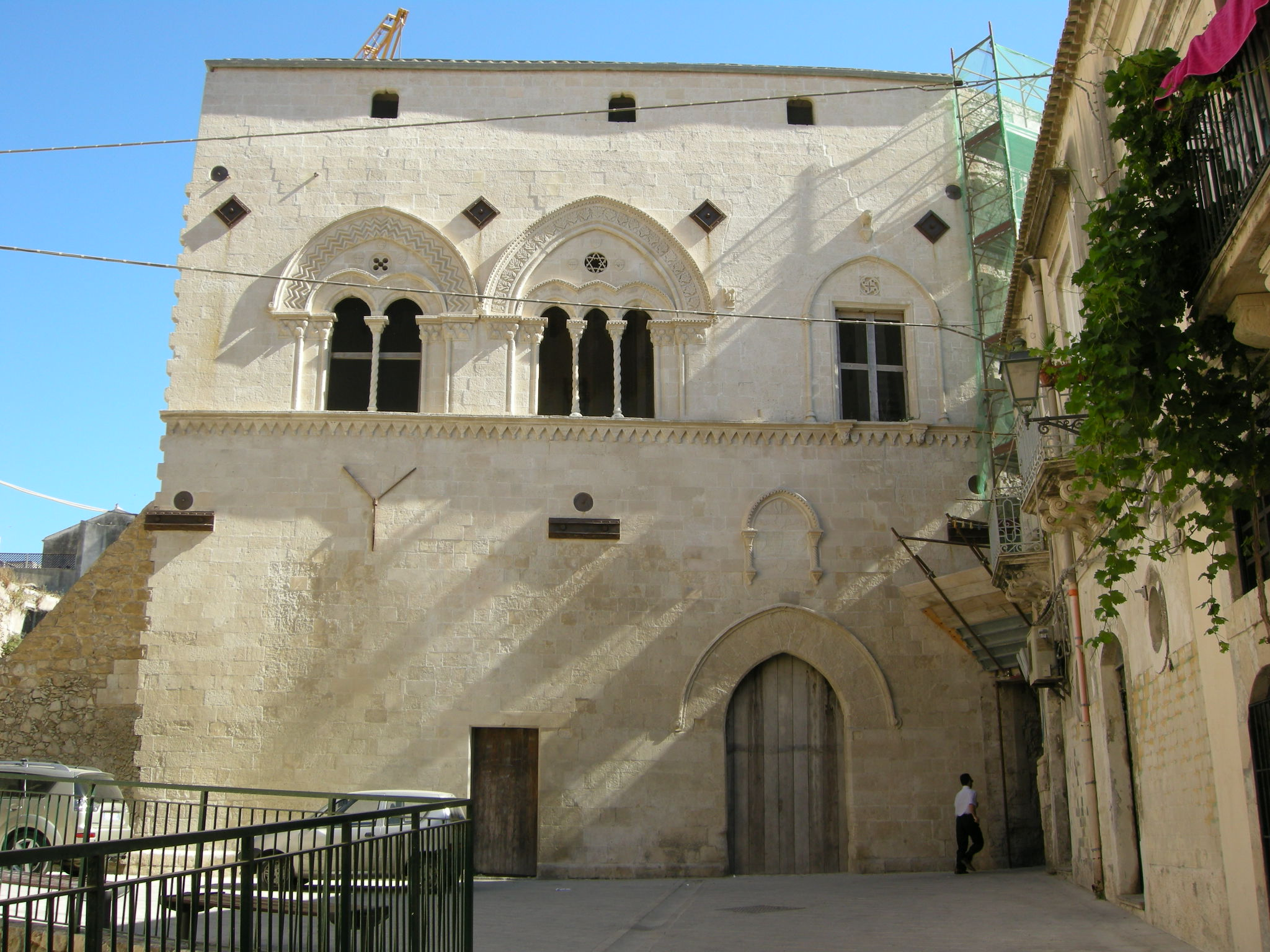 Ortigia, palazzo montalto